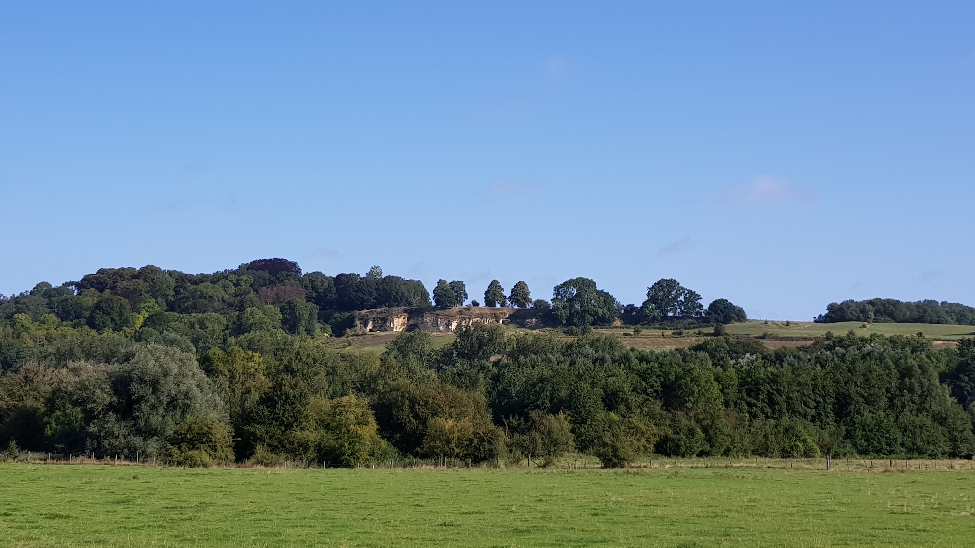 Däölkesberg, Oud-Valkenburg, Valkenburg aan de Geul, Nederland